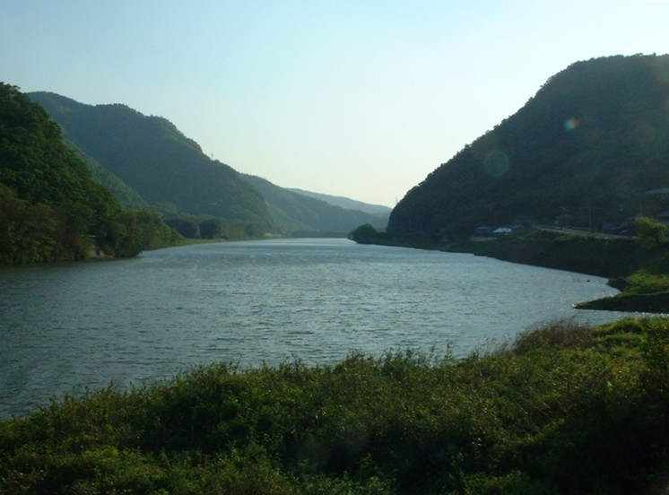 吉井川中流部の河谷 岡山県和気郡ja:佐伯町矢田